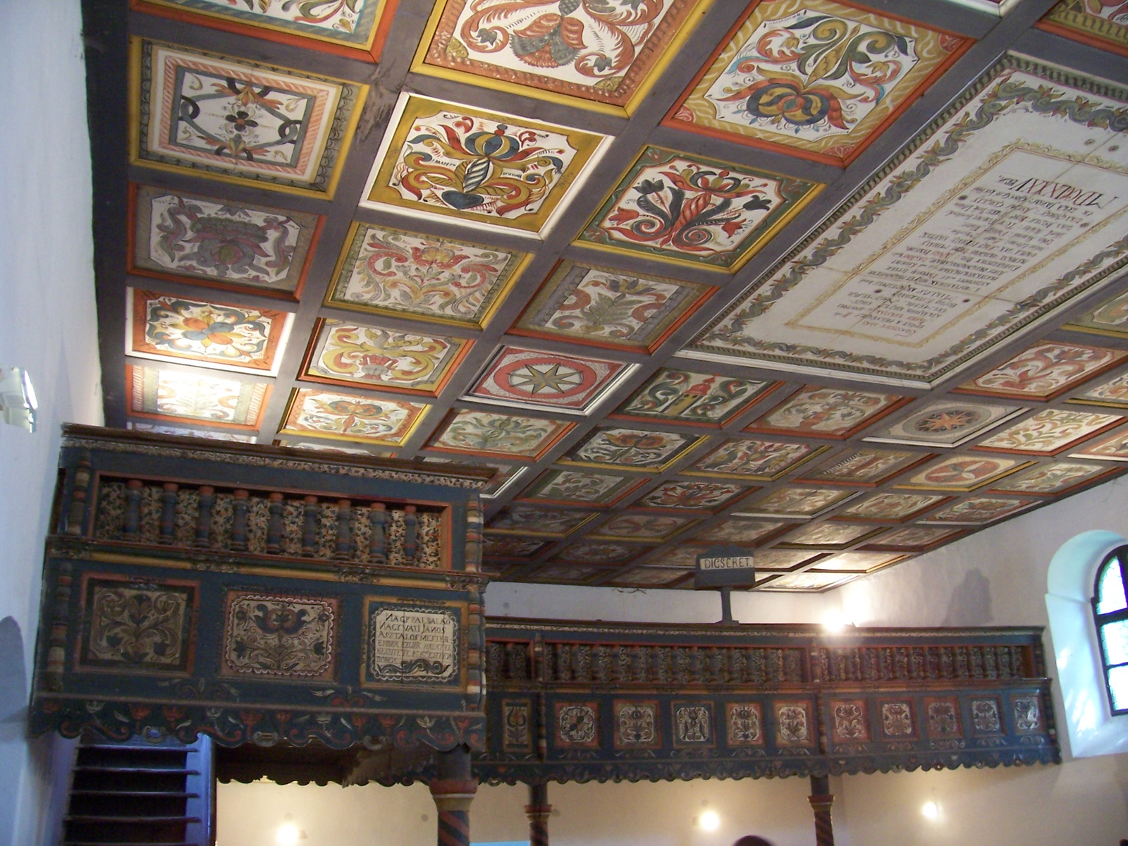 Ref. templom (Szenna, Rákóczi utca) This is a photo of a monument in Hungary. Identifier: 8111